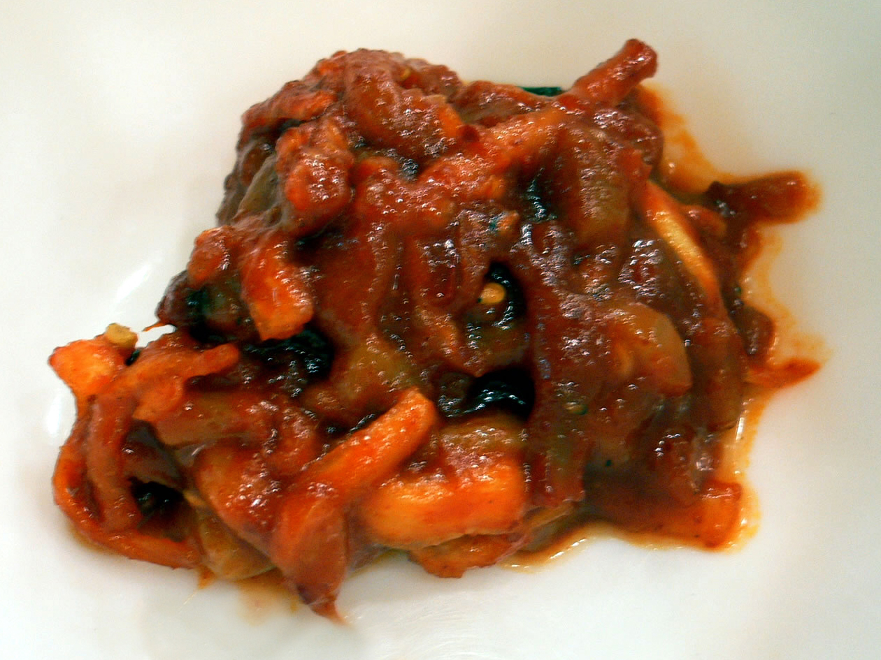 오징어 젖갈, Ojinga Jeotgal